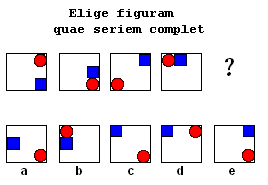 Exemplum rei in examine facultatum cognitivarum in psychologia educationali adhibito